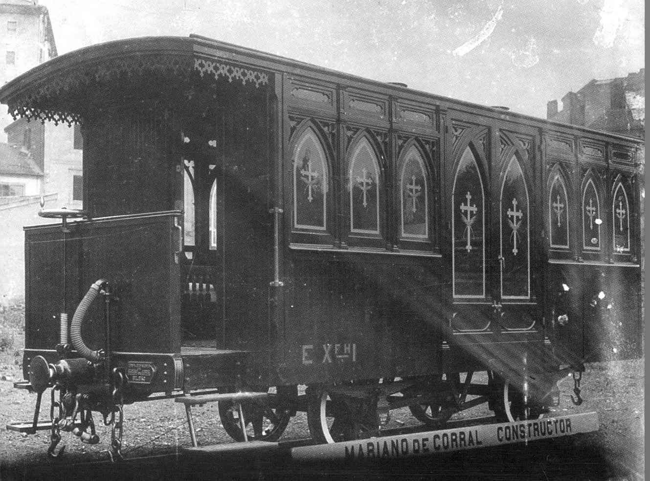 Bilbo-Lezama trenbideko hildakoen bagoia